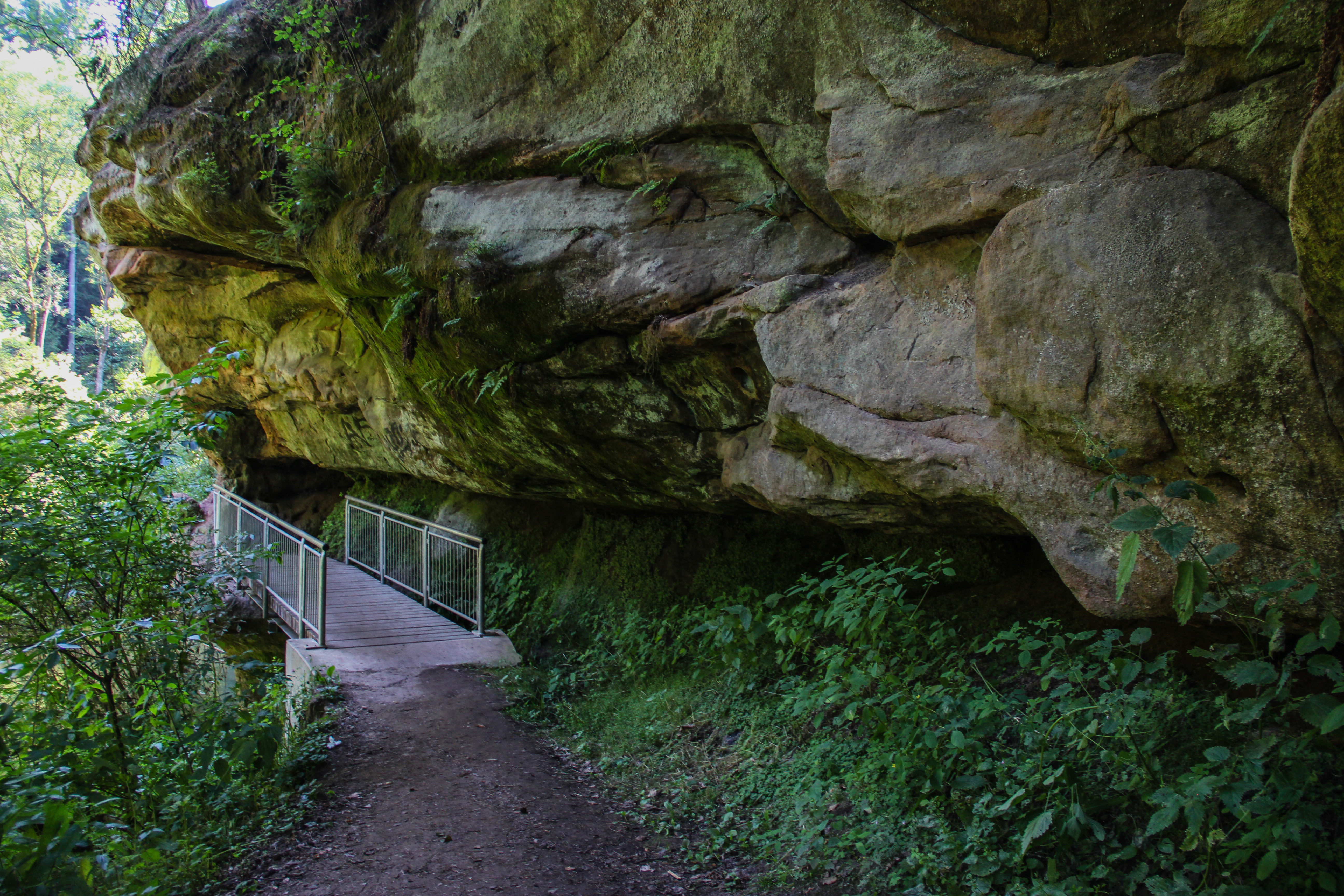 Schwarzachschlucht bei Schwarzenbruck